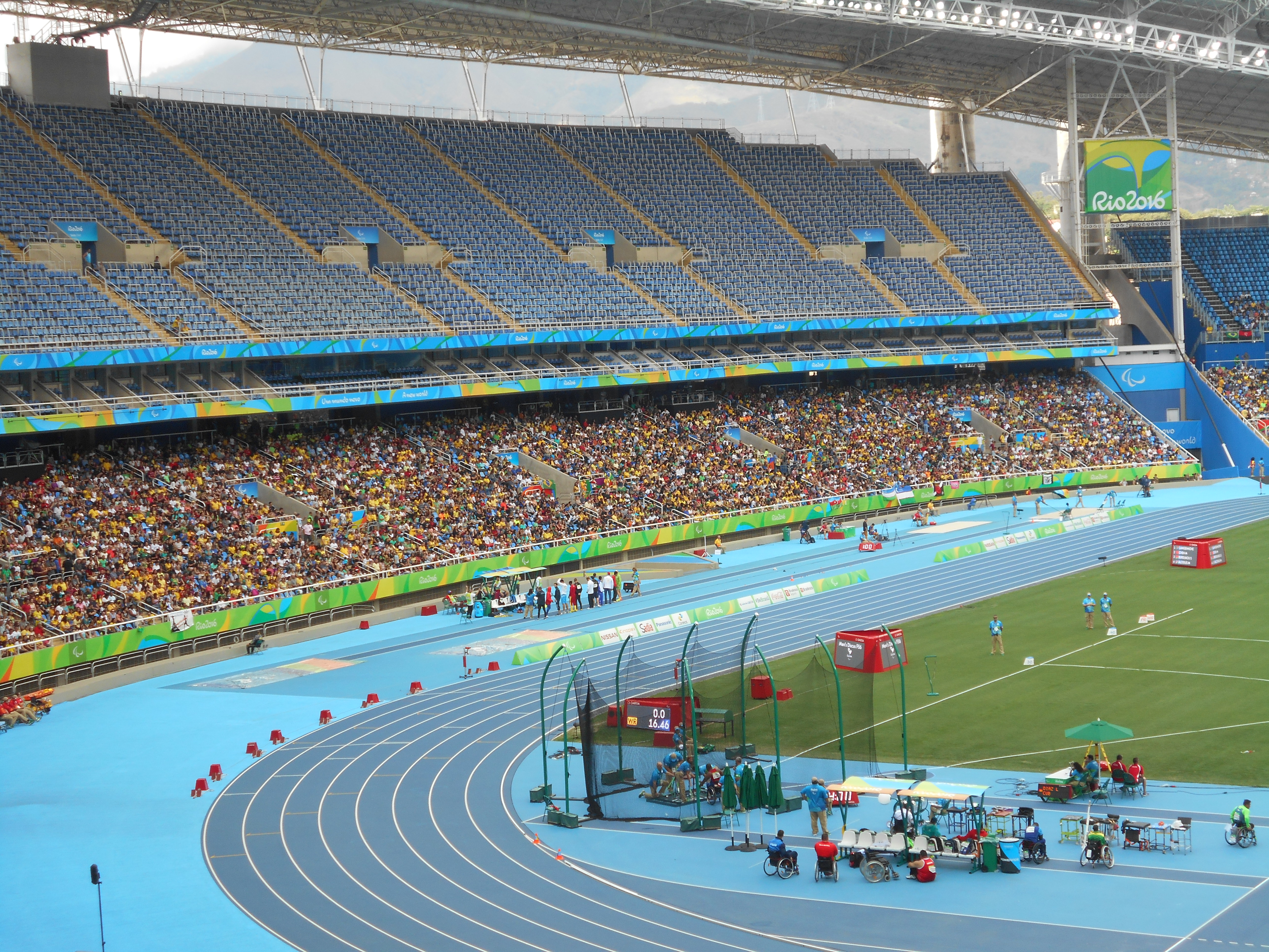 Competições de atletismo nas Paraolimpíadas Rio 2016.